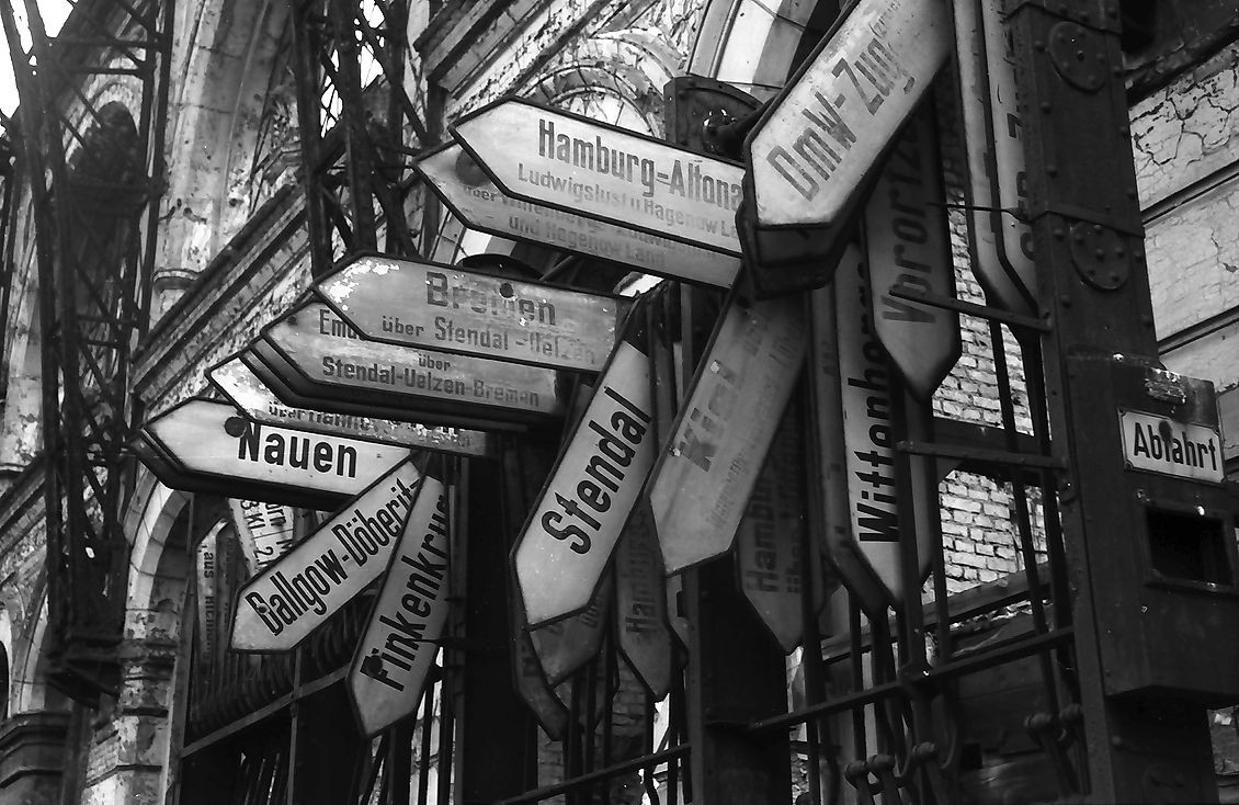 Lehrter Bahnhof in Berlin vor dem Abriss